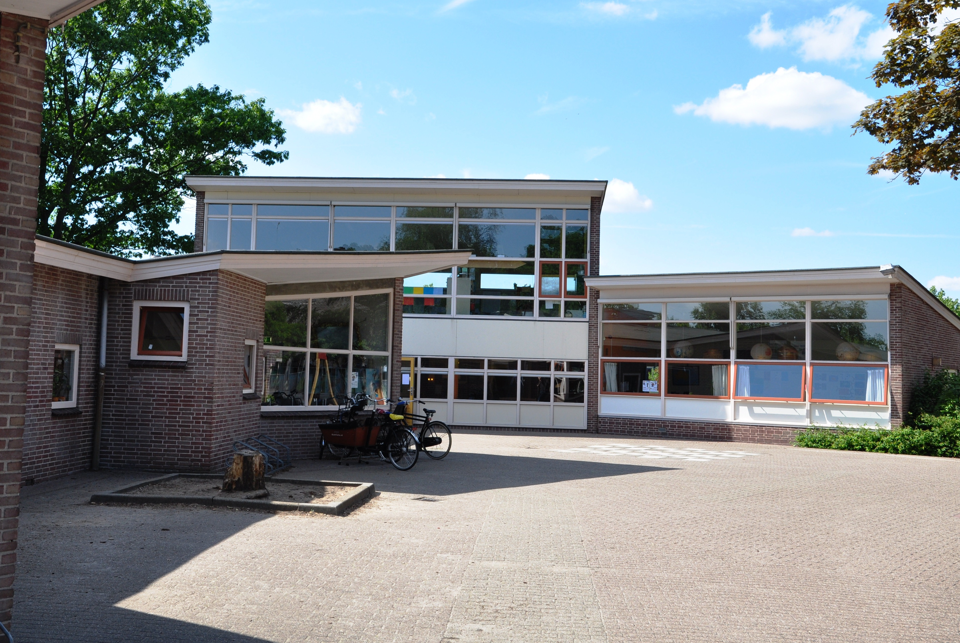 Werkplaats Kindergemeenschap in Bilthoven. Het onderwijs is gebaseerd op de pedagogische opvattingen van Kees Boeke.